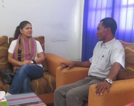 João Tilmando Rego, Administrator der Gemeinde Aileu im Gespräch mit First Lady Isabel da Costa Ferreira